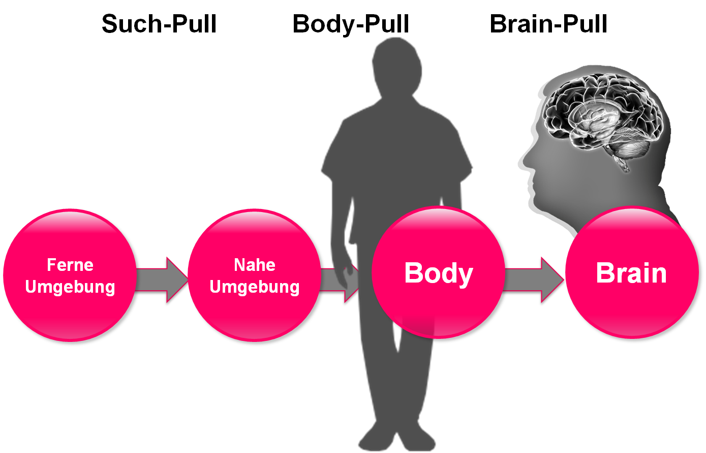 Darstellung einer Energie-Lieferkette